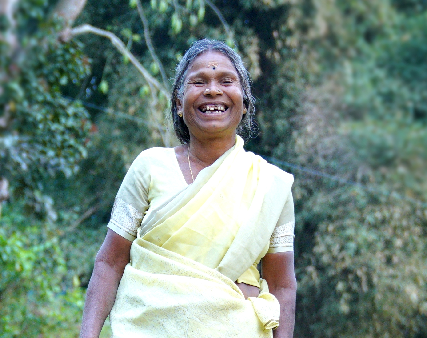 നഞ്ചിയമ്മ